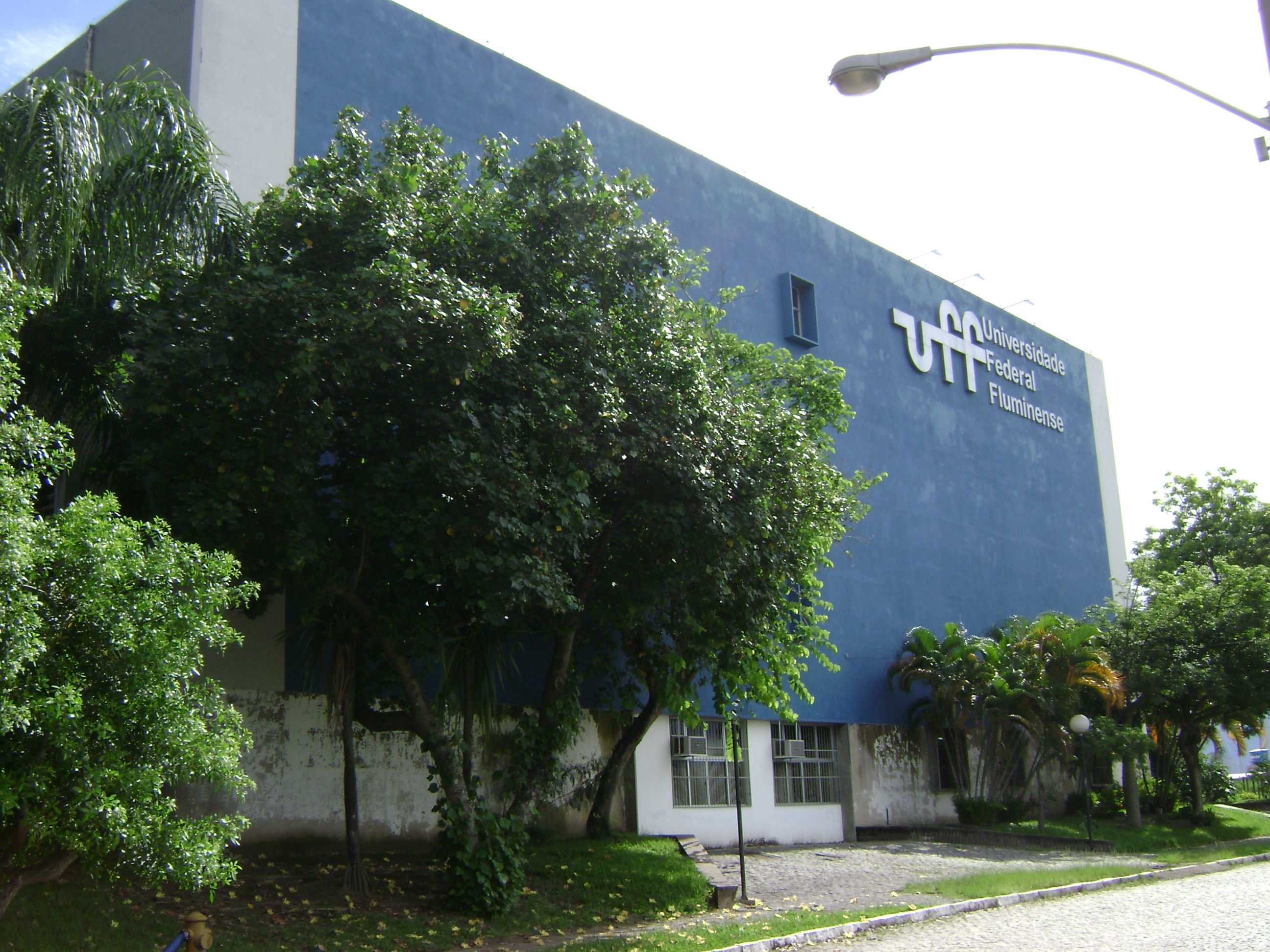 Prédio da biblioteca central da UFF em Niterói.